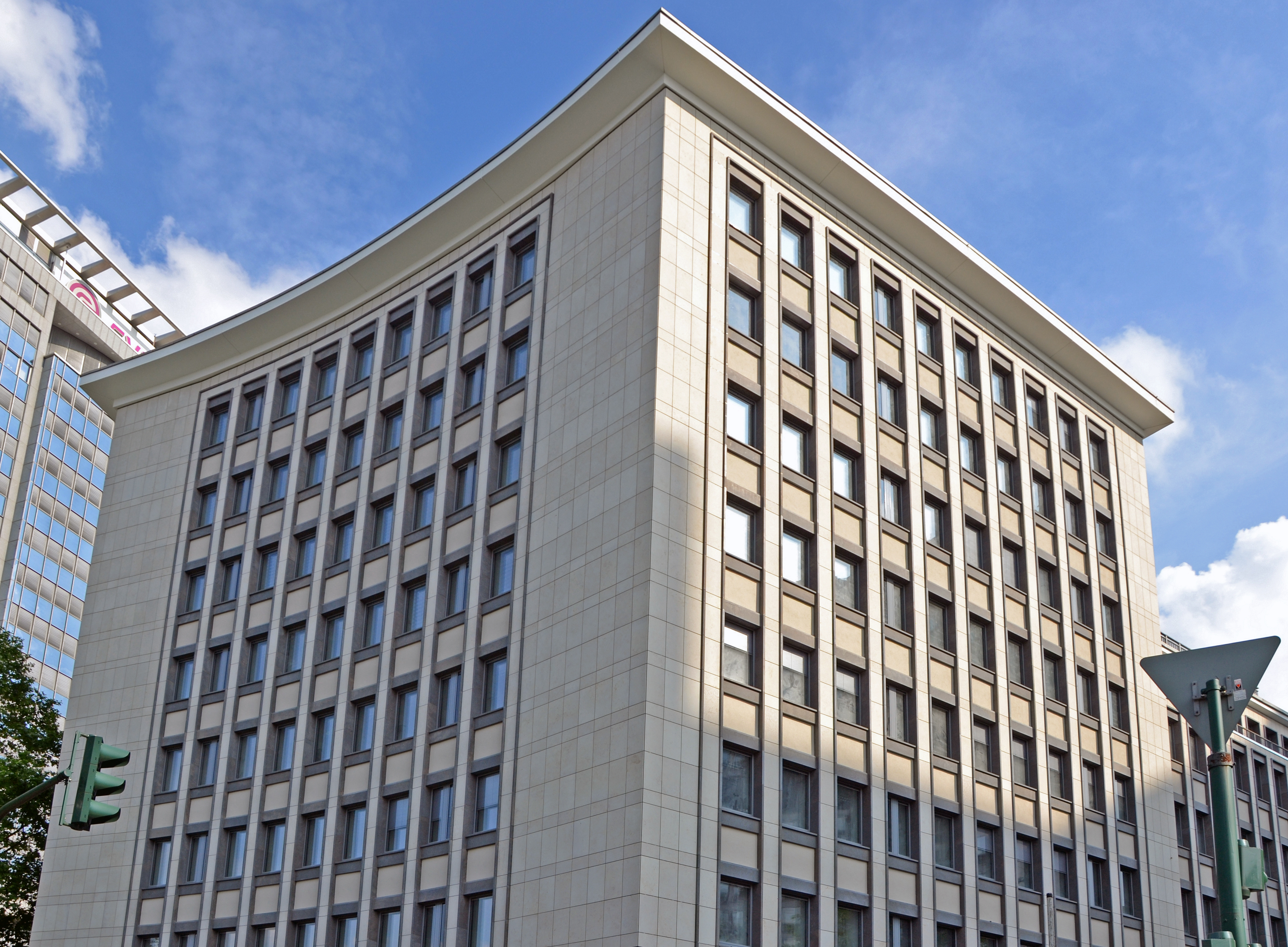 Nordsternhaus im Essener Südviertel; einst Sitz der Nordsternvericherung, später RWE, 2016 saniert